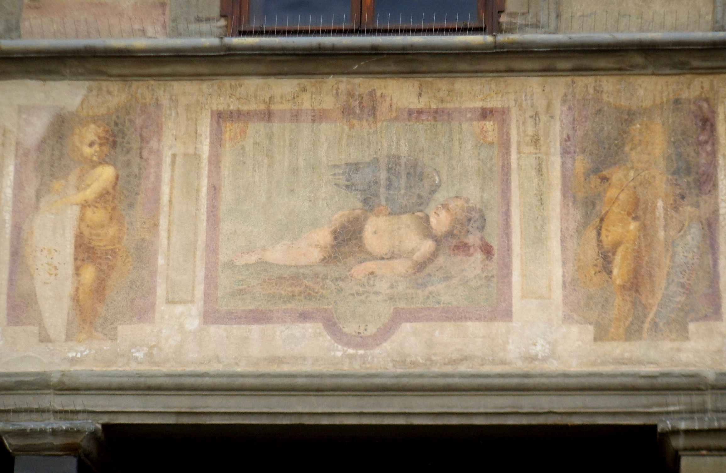 Palazzo_dell'Antella,_amorino fresco on the façade in Florence, italy